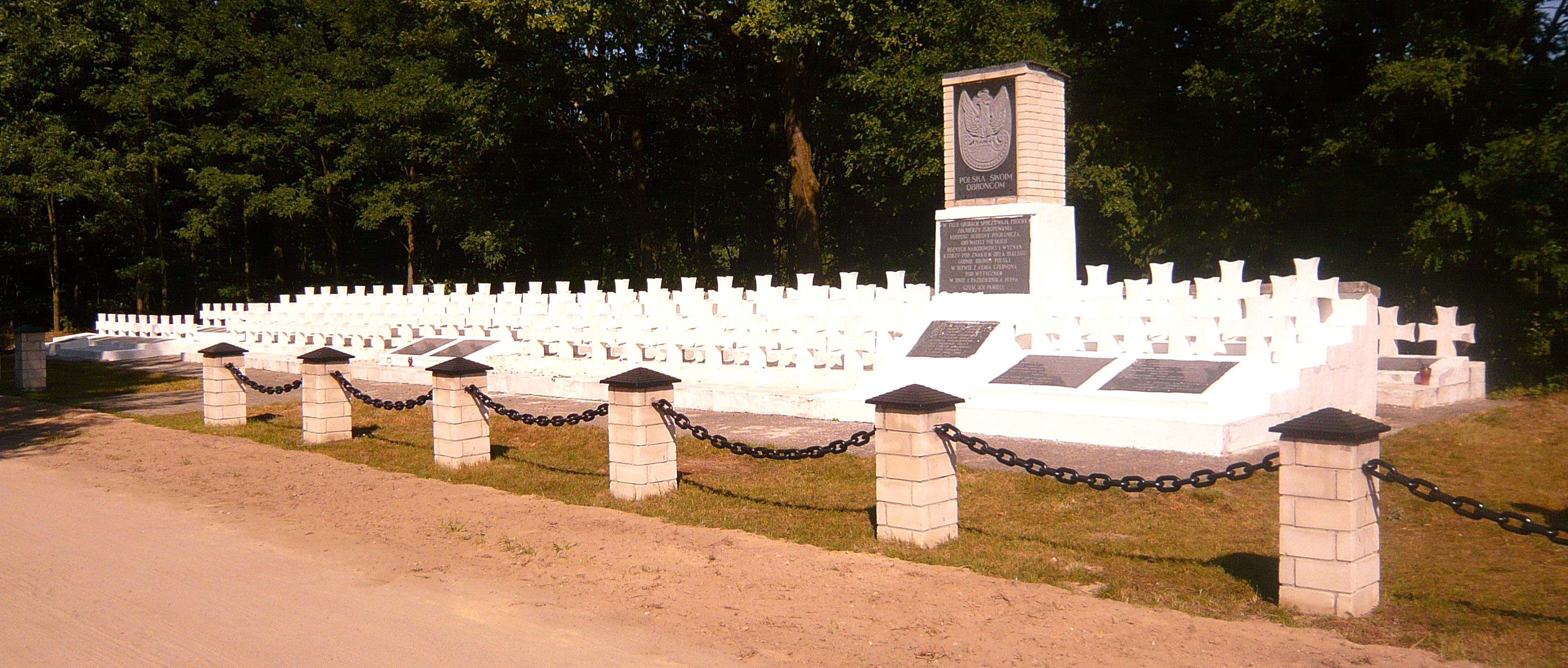 Wytyczno - cmentarz żołnierzy KOP poległych w walkach i z Armią Czerwoną oraz zamordowanych w niewoli przez żołnierzy Armii Czerwonej